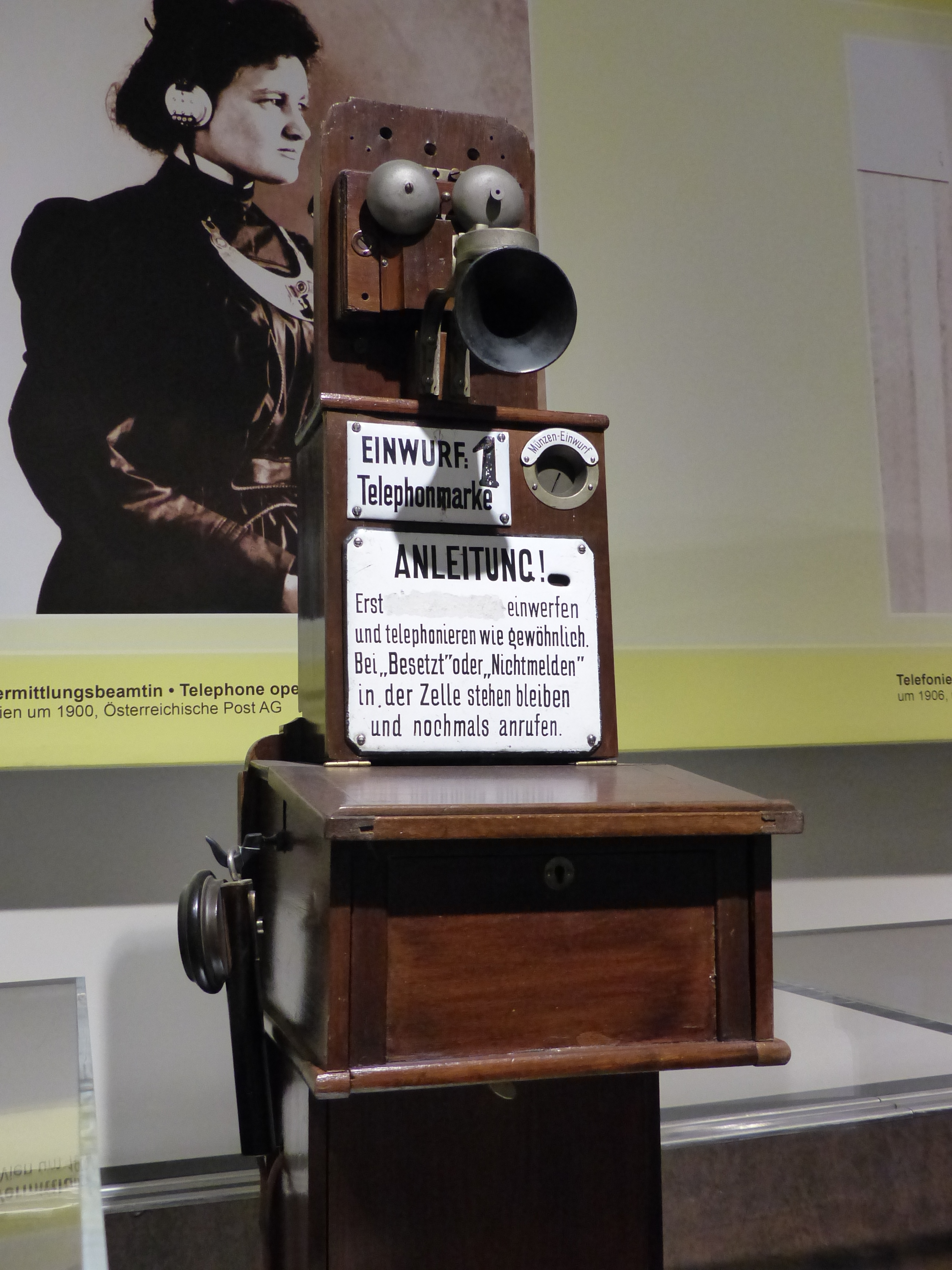 Münztelefon, Telefonautomaten-Gesellschaft Wien 1903; Exponat im Technischen Museum Wien